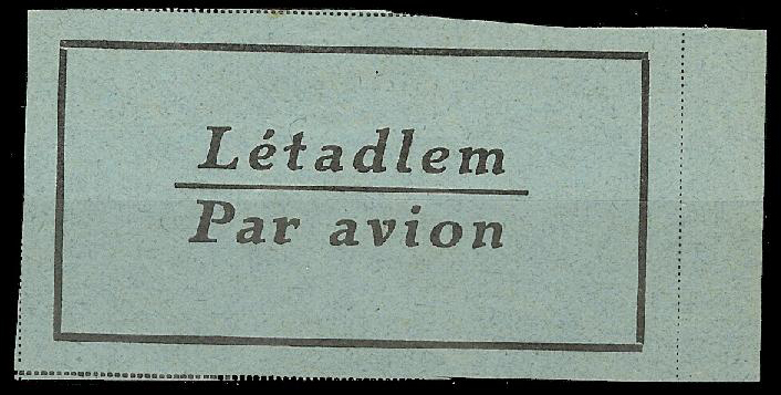 Авиапочтовый ярлык Чехословакии